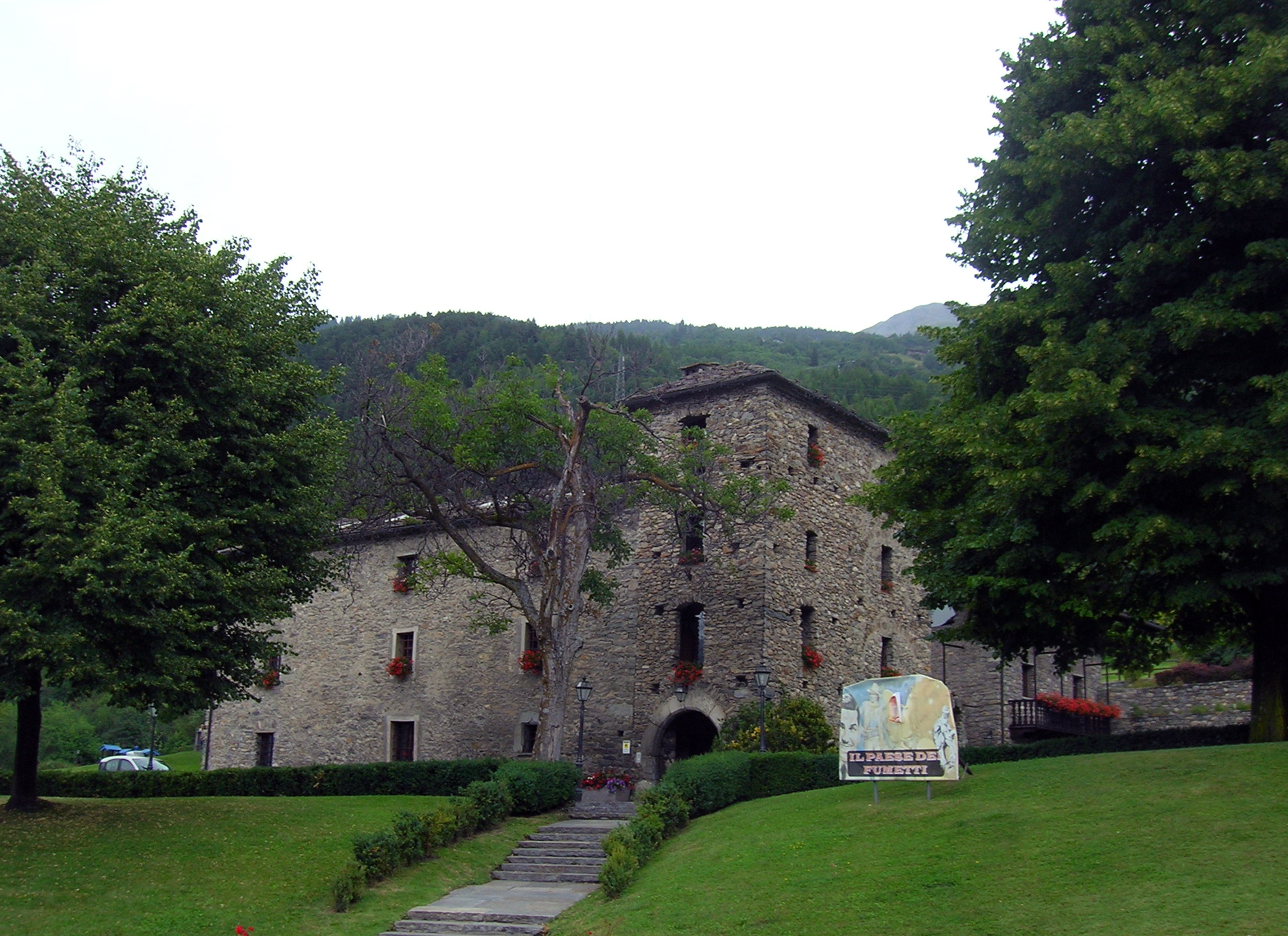 Maison Gerbollier, La Salle, Valle d'Aosta, Italia.